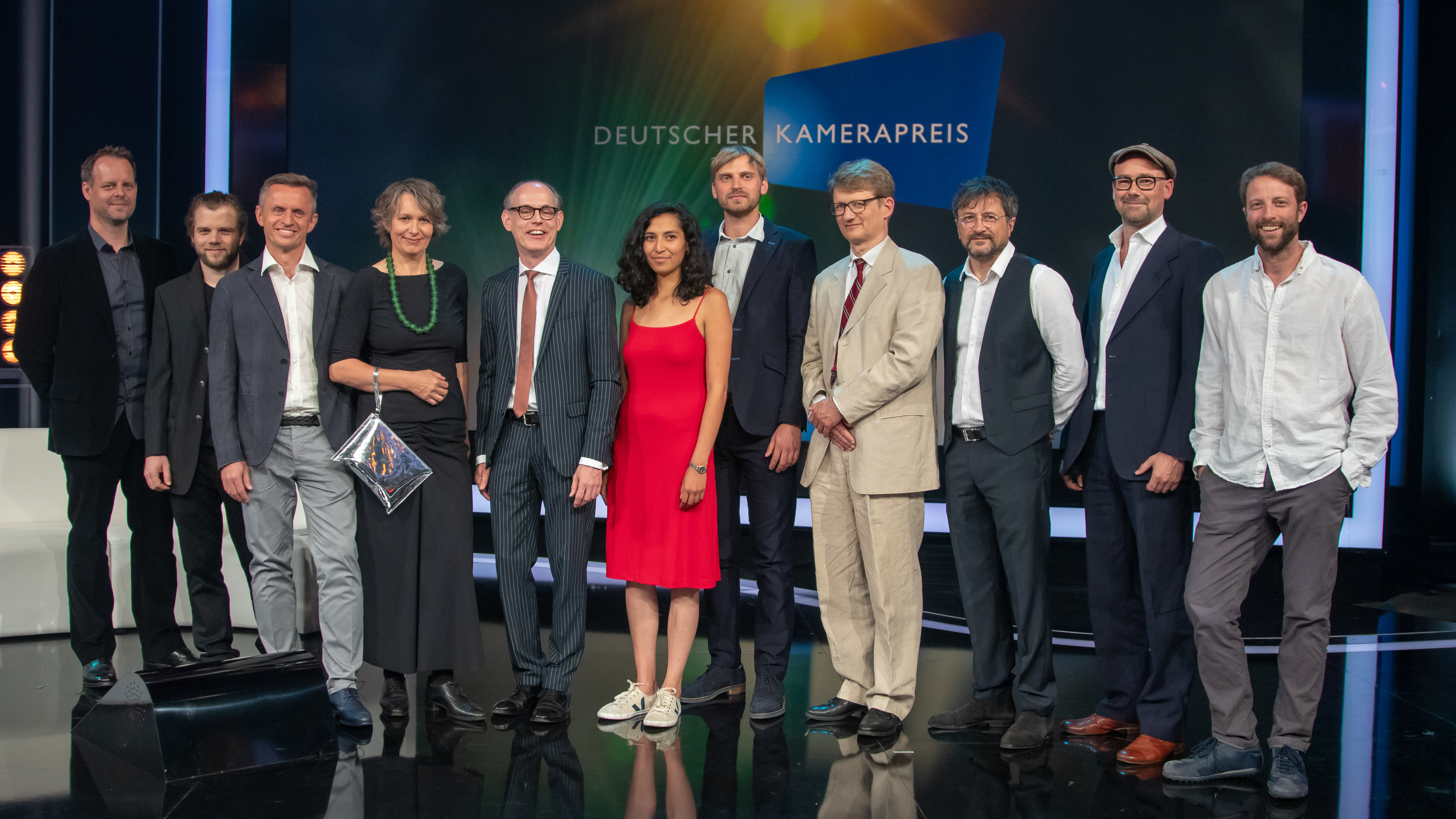 Deutscher Kamerapreis 2018 - Preisträger_innen auf der Bühne